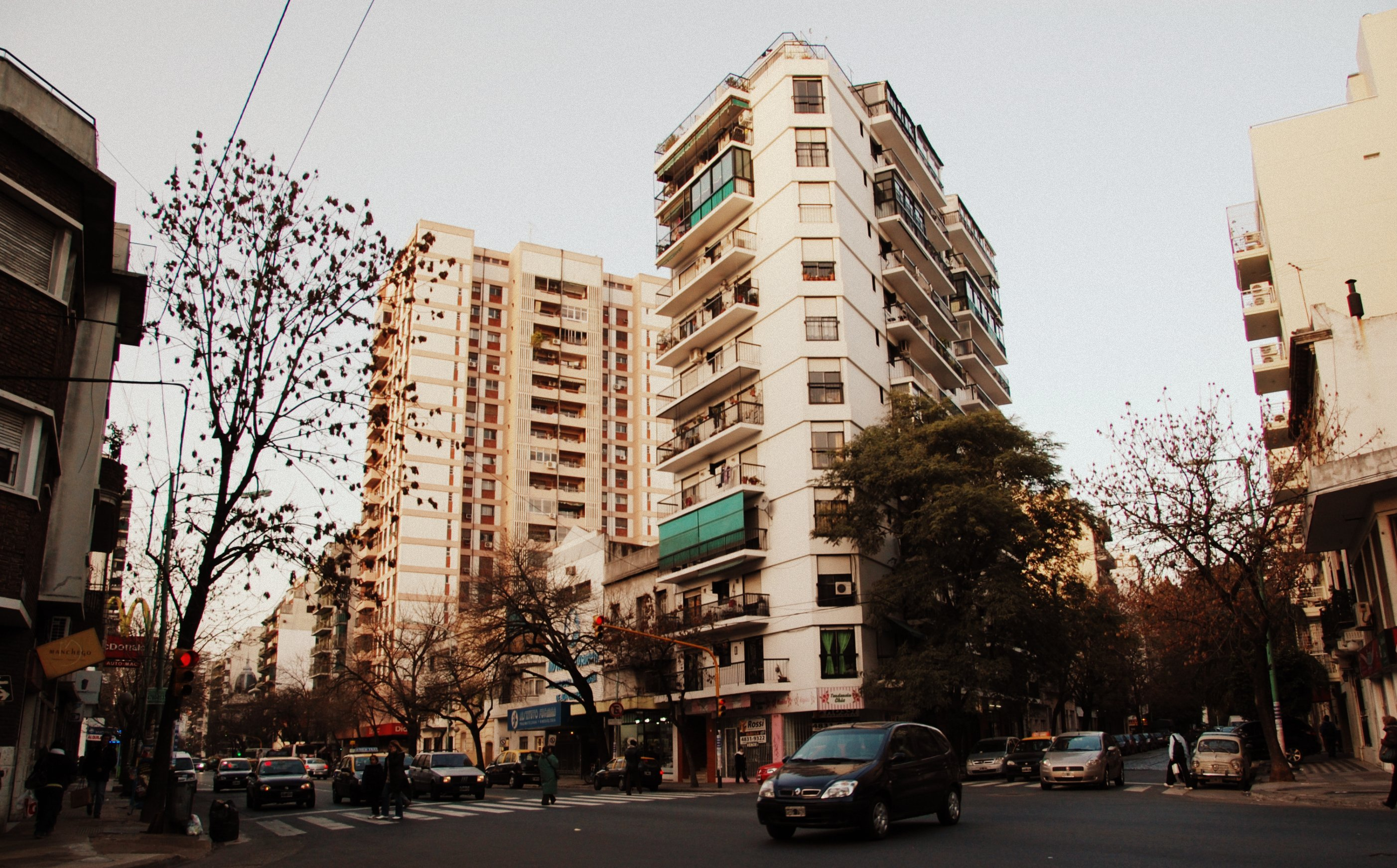 2000 block of Scalabrini Ortiz Avenue. Buenos Aires, Argentina.